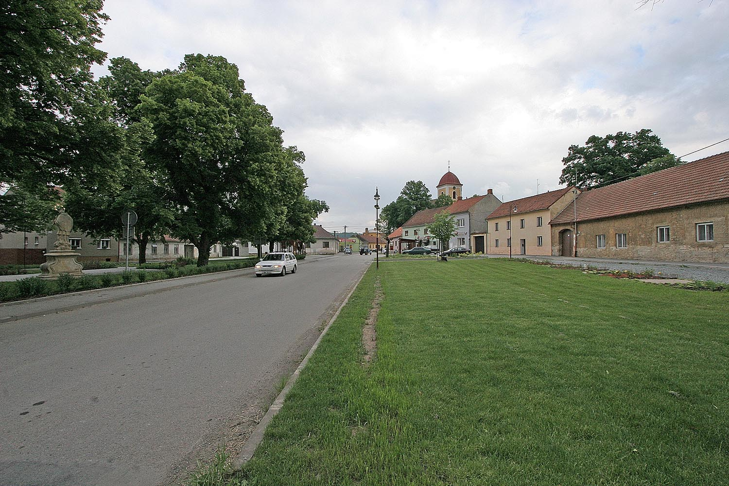 Náměstí v městečku Svitávka v okrese Blansko